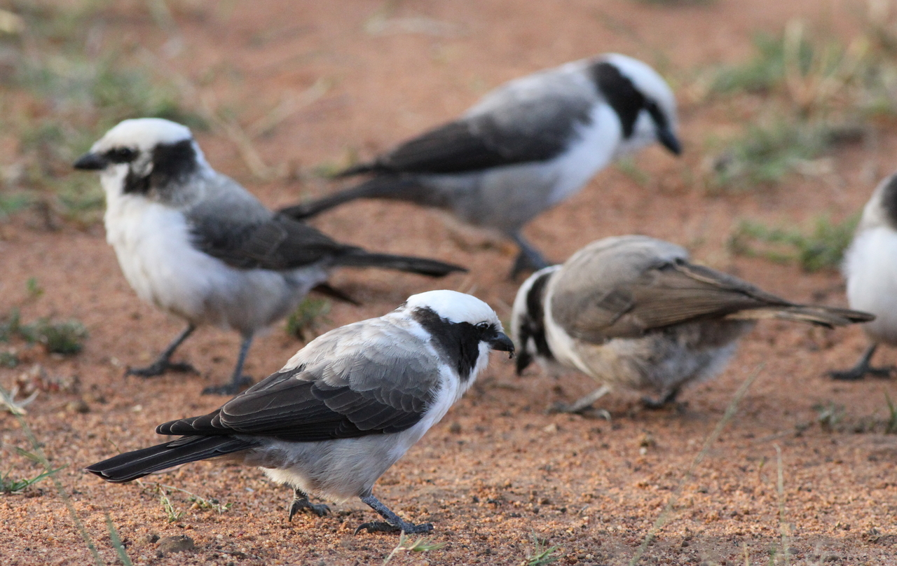 Familiengruppe des Weißscheitelwürgers bei der Nahrungssuche